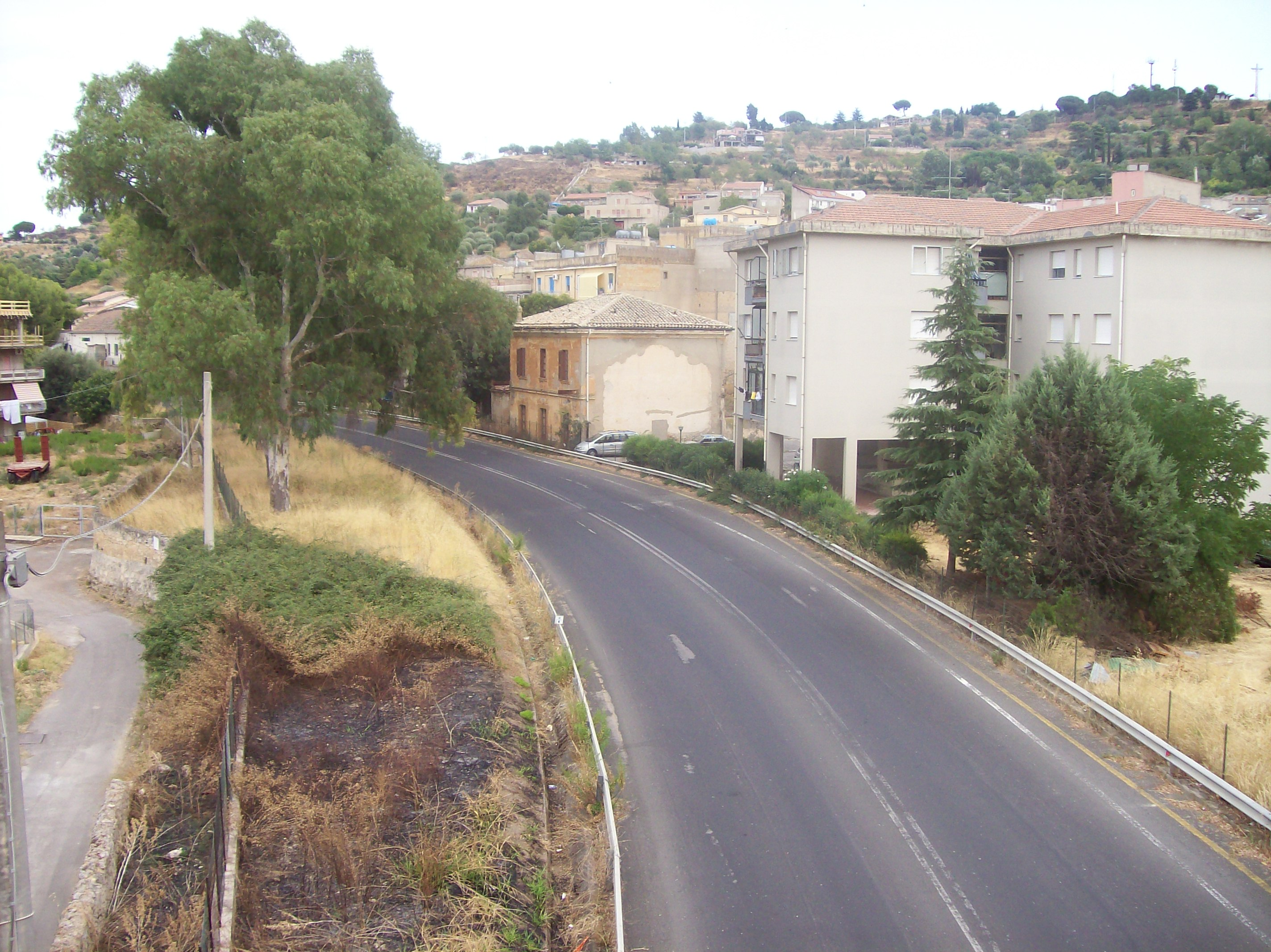 Il fabbricato viaggiatori della stazione di Valguernera sulla dismessa Dittaino-Caltagirone